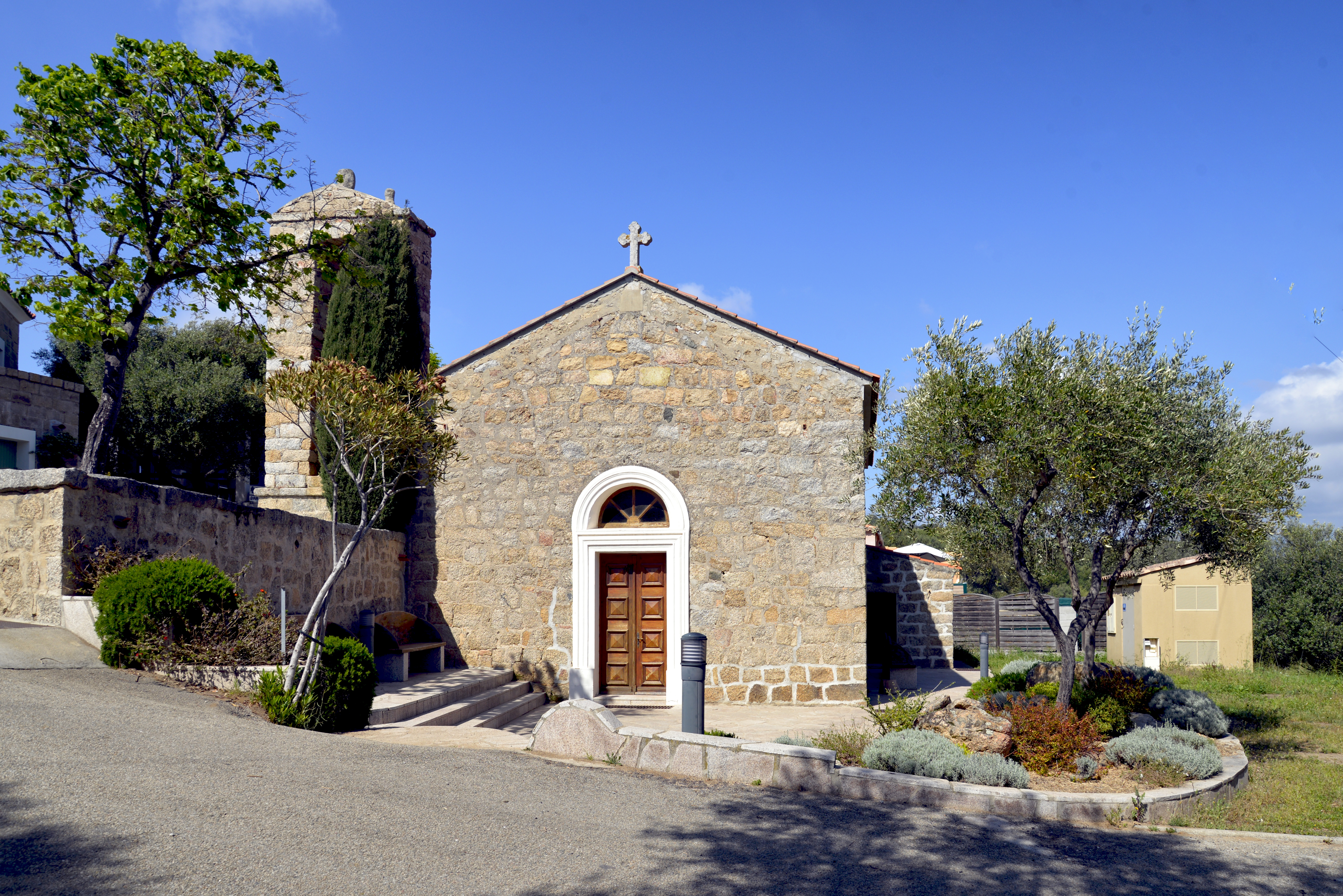 Serra-di-Ferro, Valinco (Corse-du-Sud) - Façade principale de l’église Sant’Antonu du XIXe siècle.